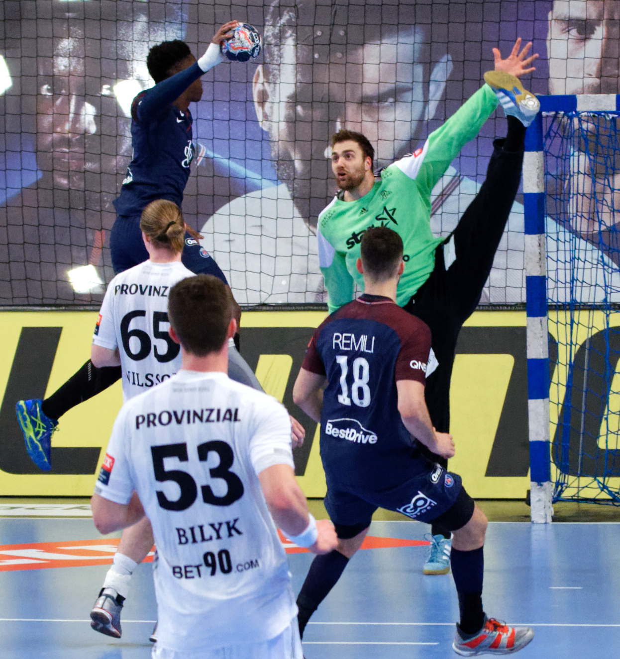 Rencontre de phase de groupe de la ligue des champions 2017/18 entre le PSG et Kiel. A Coubertin, le 4 mars 2018.